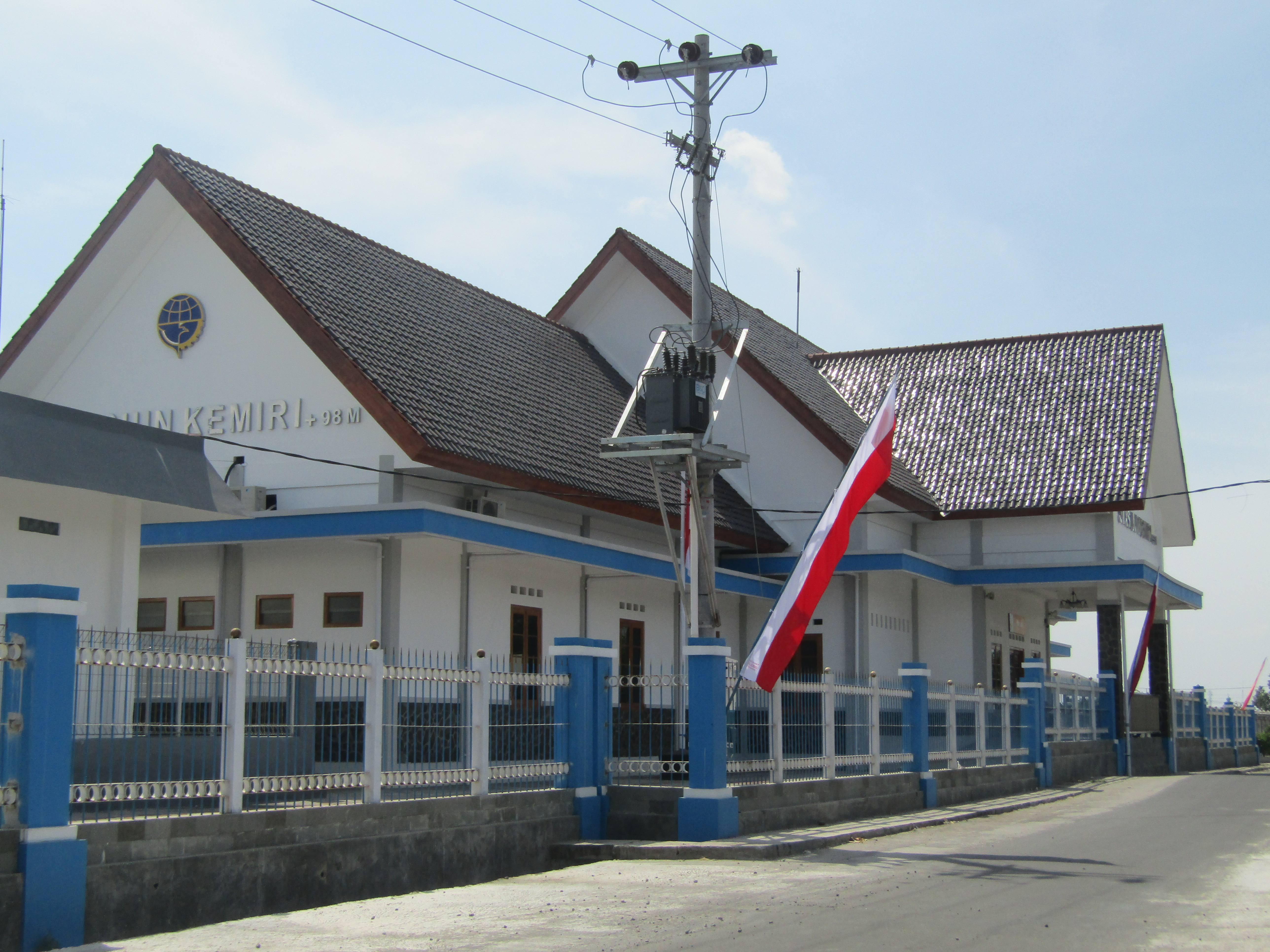 Tampak perspektif Stasiun Kemiri Baru. Bangunan lama sudah dirobohkan.